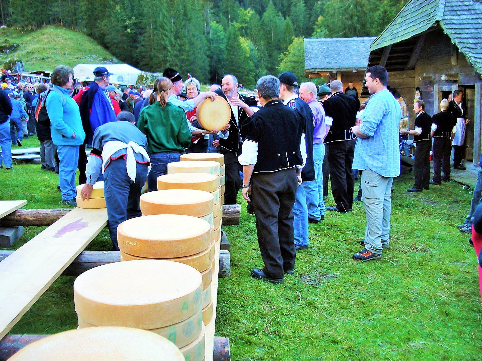 Justistal BE, Switzerland